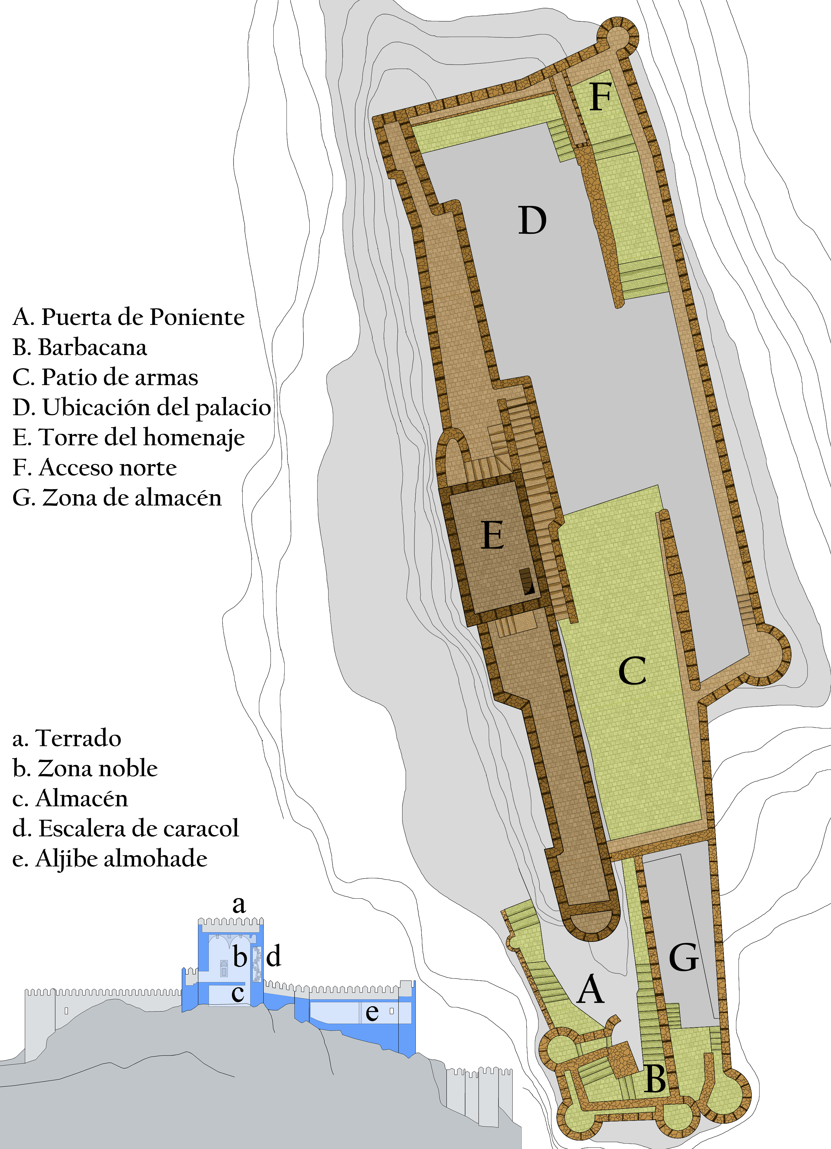 Plano del castillo de Almansa. Se indican los principales elementos de la fortificación en planta y un perfil para mostrar las estancias de la torre del homenaje. Almansa, provincia de Albacete, Castilla la Mancha, España.